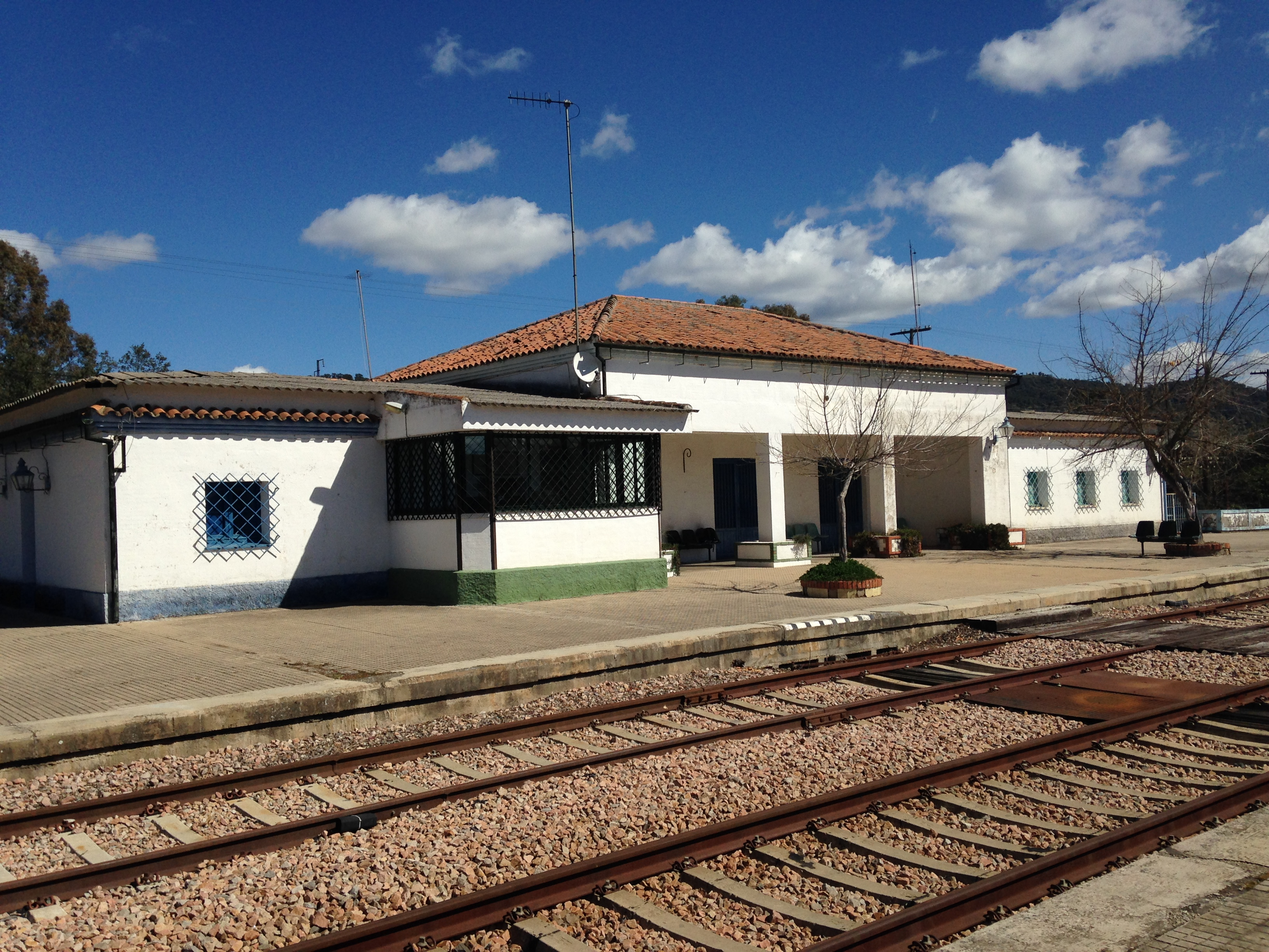 Estación de la Alhondiguilla-Villaviciosa en el municipio de Espiel (Córdoba)